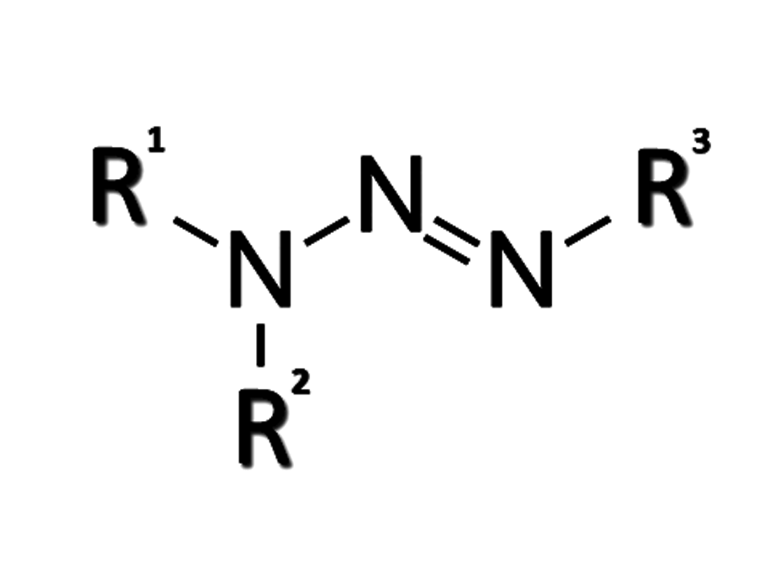 Gruppo funzionale di due gruppi compositi ammina+azo